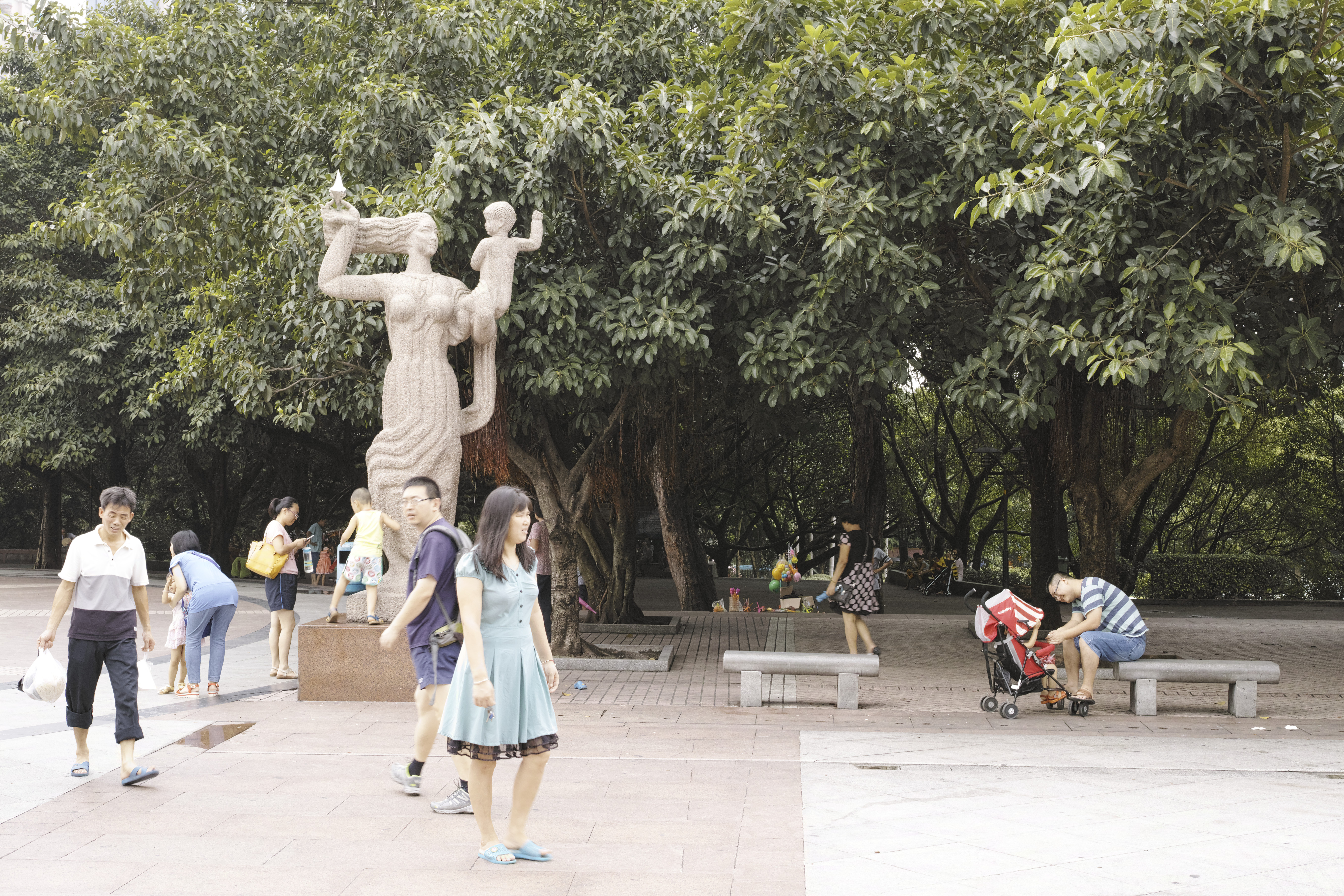 Platz vor dem Kunstmuseum Guangzhou